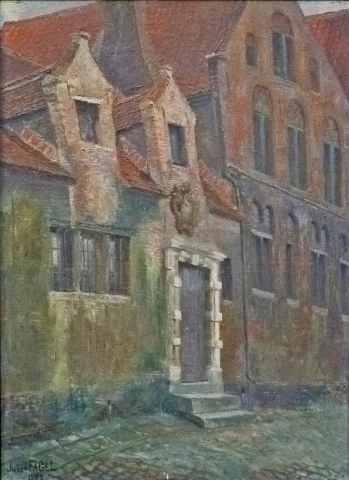 "Brugs straatje", olieverf op doek (70 x 51 cm) door de Belgische kunstschilderJulien Fagel (1881-1937); privébezit